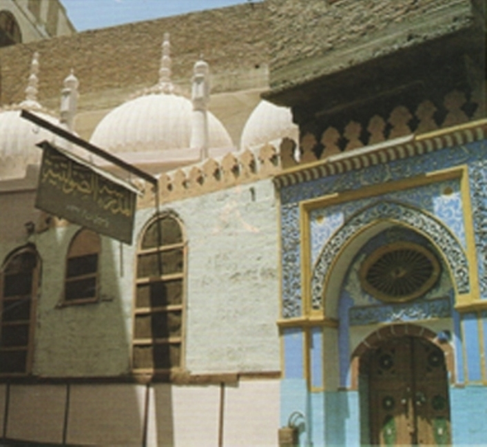 صورة لبوابة مدخل المدرسة الصولتية الأمامية، ويظهر في الصورة أيضاً لوحة اسم المدرسة مع تاريخ تأسيسها عام 1292هـ.